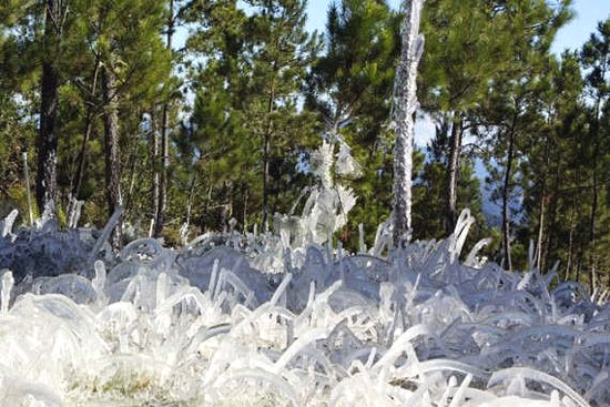 Helada en Valle Nuevo National Park, Dominican Republic.